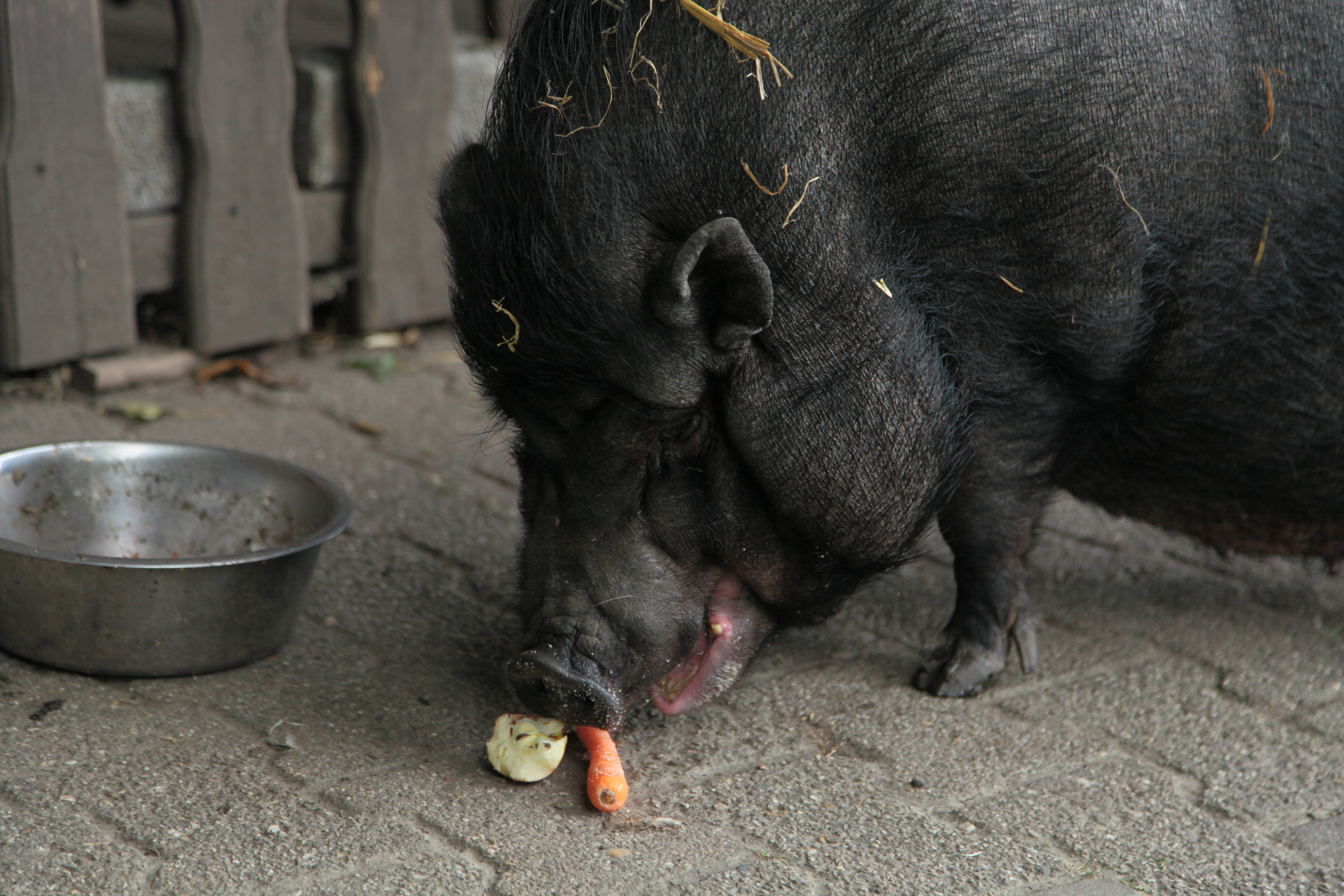 Hängebauchschwein im Wildgehege Schonnebeck, Matthias-Erzberger-Straße in Essen